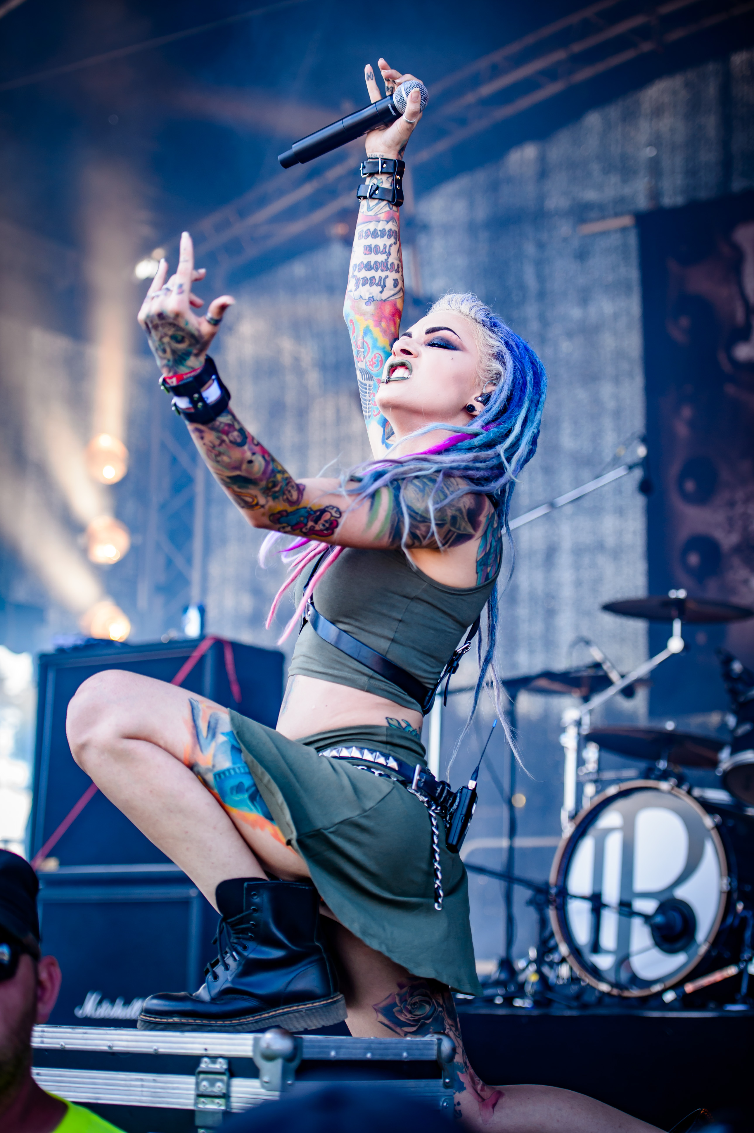 'Summer Breeze Festival 2017; Dinkelsbühl': 'Infected Rain'